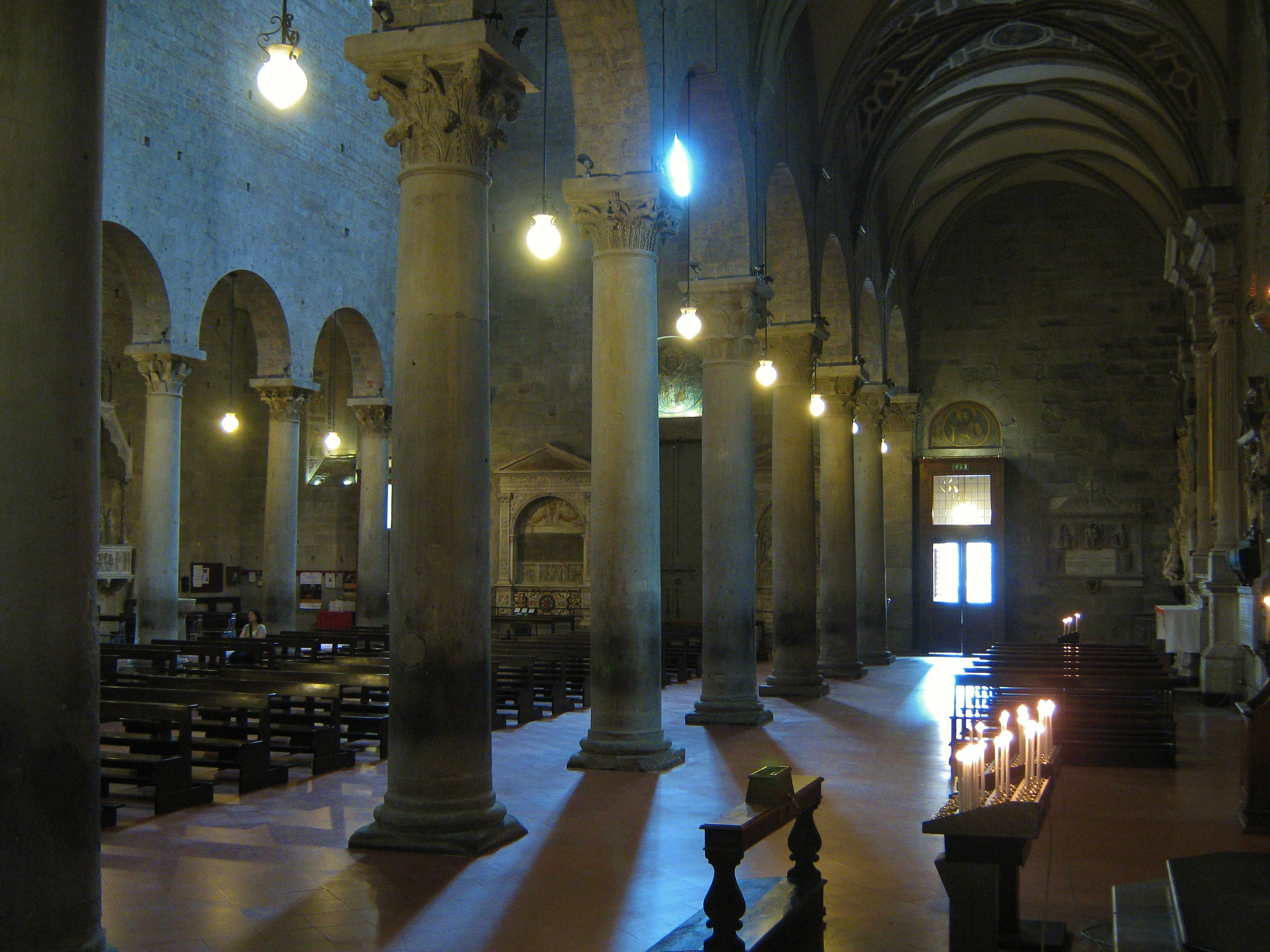 Pistoia: interno del duomo. Veduta verso la controfacciata dalla navata laterale